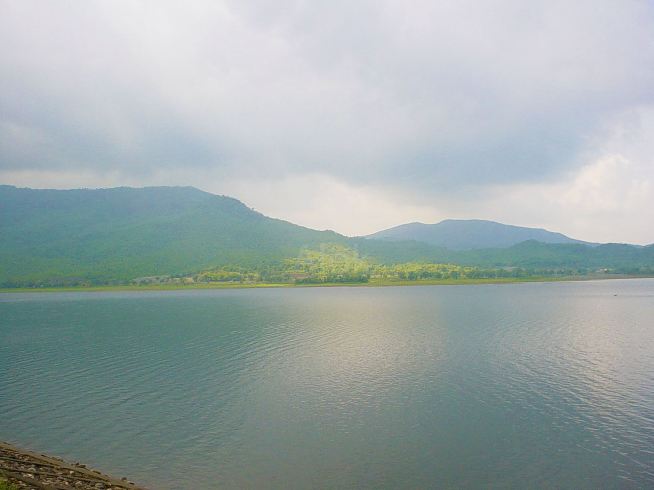 Dimna Lake